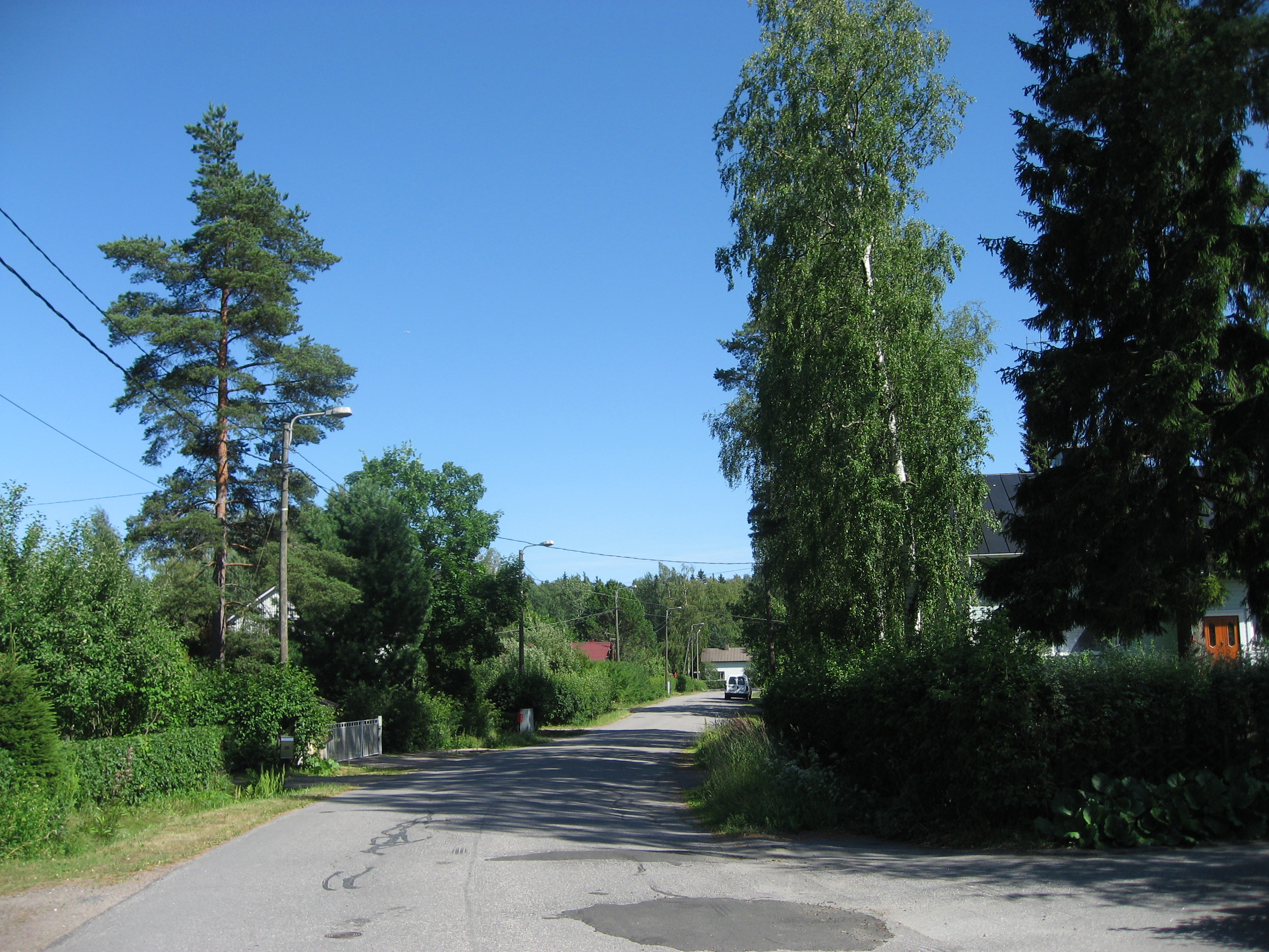 Maununneva suburb in Helsinki Finland, 12-07-2006.